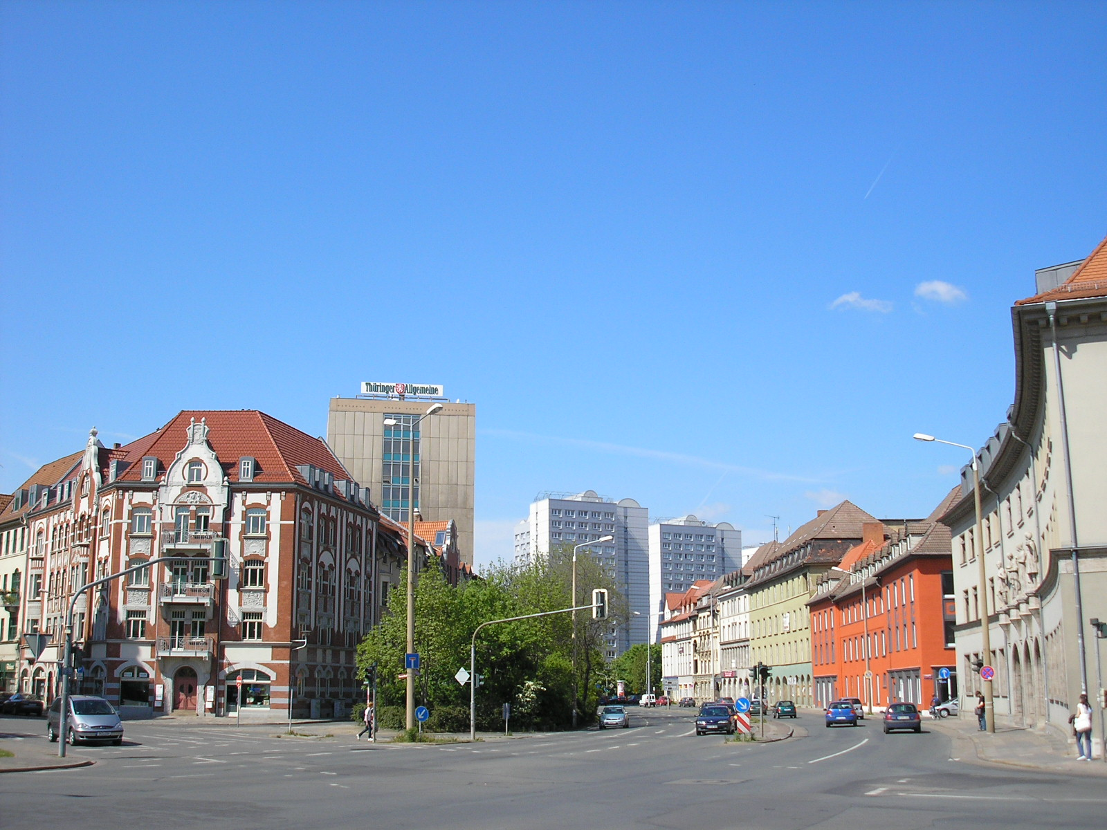 Handelshäuser am Juri-Gagarin-Ring/Ecke Trommsdorffstraße in Erfurt (Thüringen).